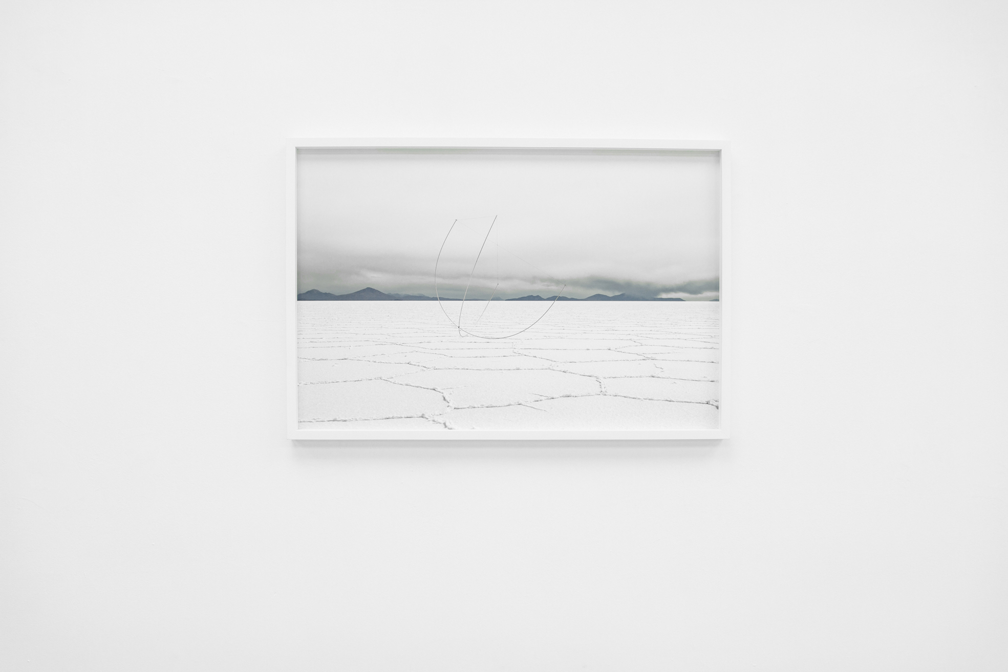 Michał Smandek, Wywoływanie rzeźby, Szkielety, widok wystawy, Galeria Miejska BWA w Bydgoszczy, 2018